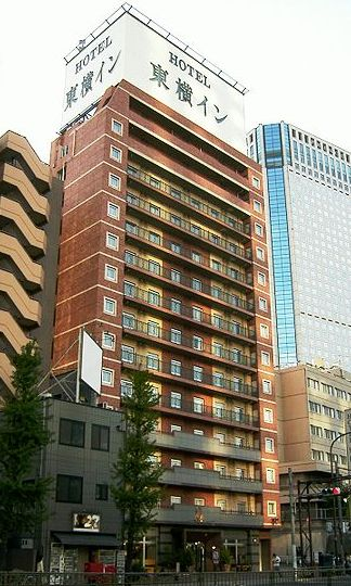 The_Toyoko_Inn_Takanawa. Tokyo, Japan